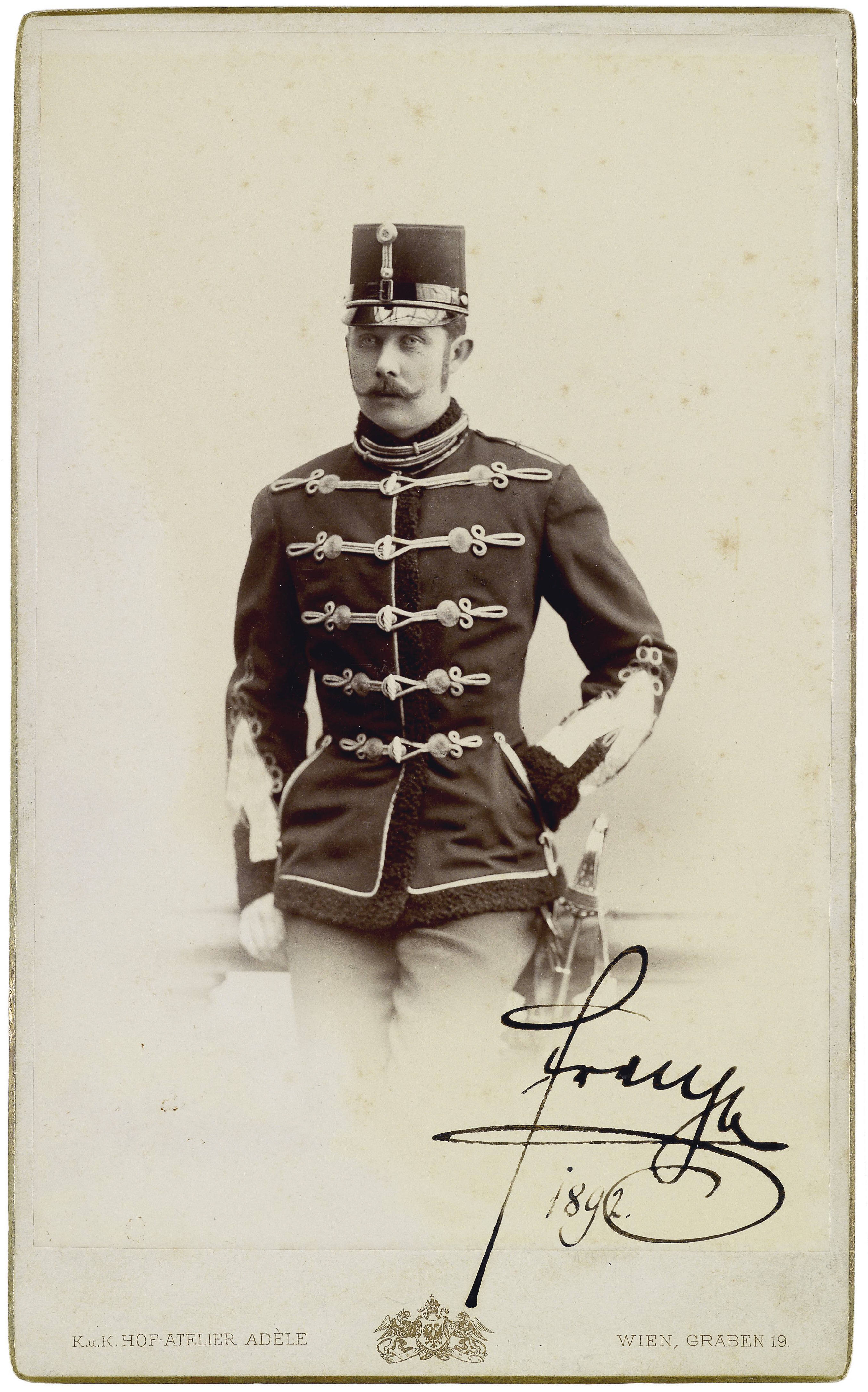 Franz Ferdinand von Österreich-Este, Porträtphotographie mit eigenhändiger Unterschrift 1892, Originaluntersatzkarton, 22 x 13,5 cm